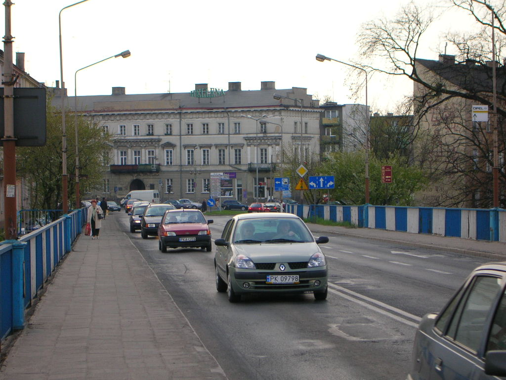 Most Warszawski w Kaliszu. Autor : Bartek Wawraszko (Bast)